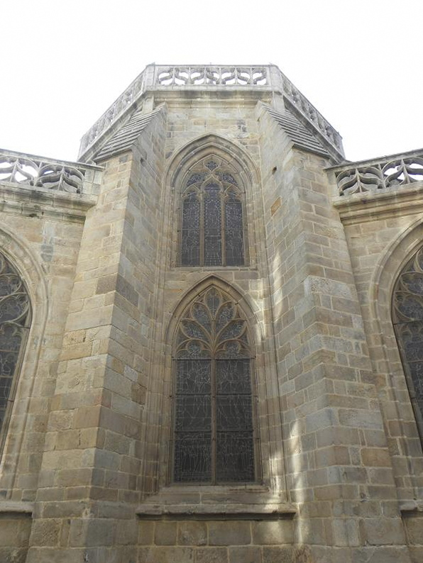 Abside de la basilique Notre-Dame de Bon-Secours de Guingamp (22). .